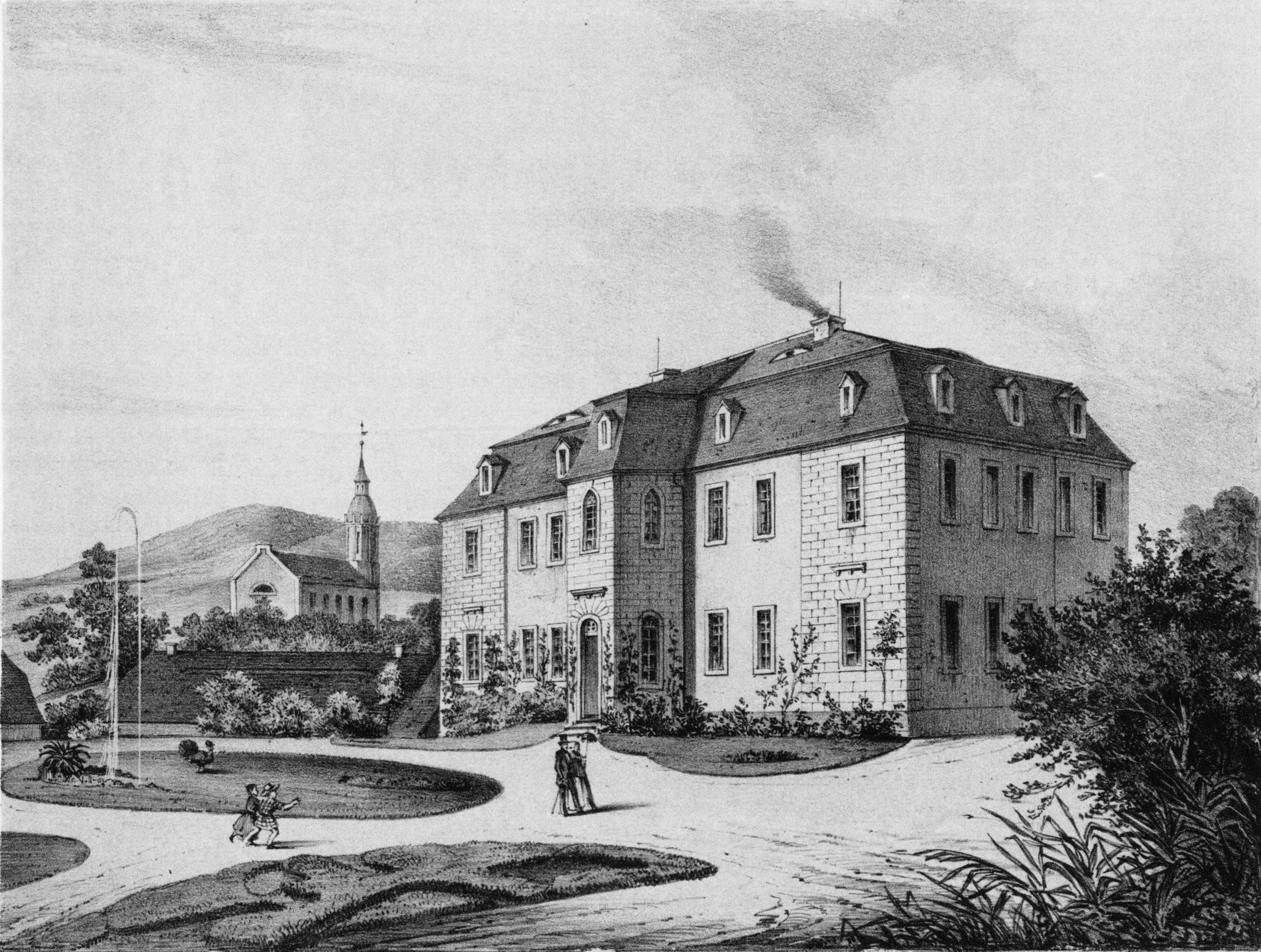 Das Rittergut Mittel-Sohland Mitte des 19. Jahrhunderts